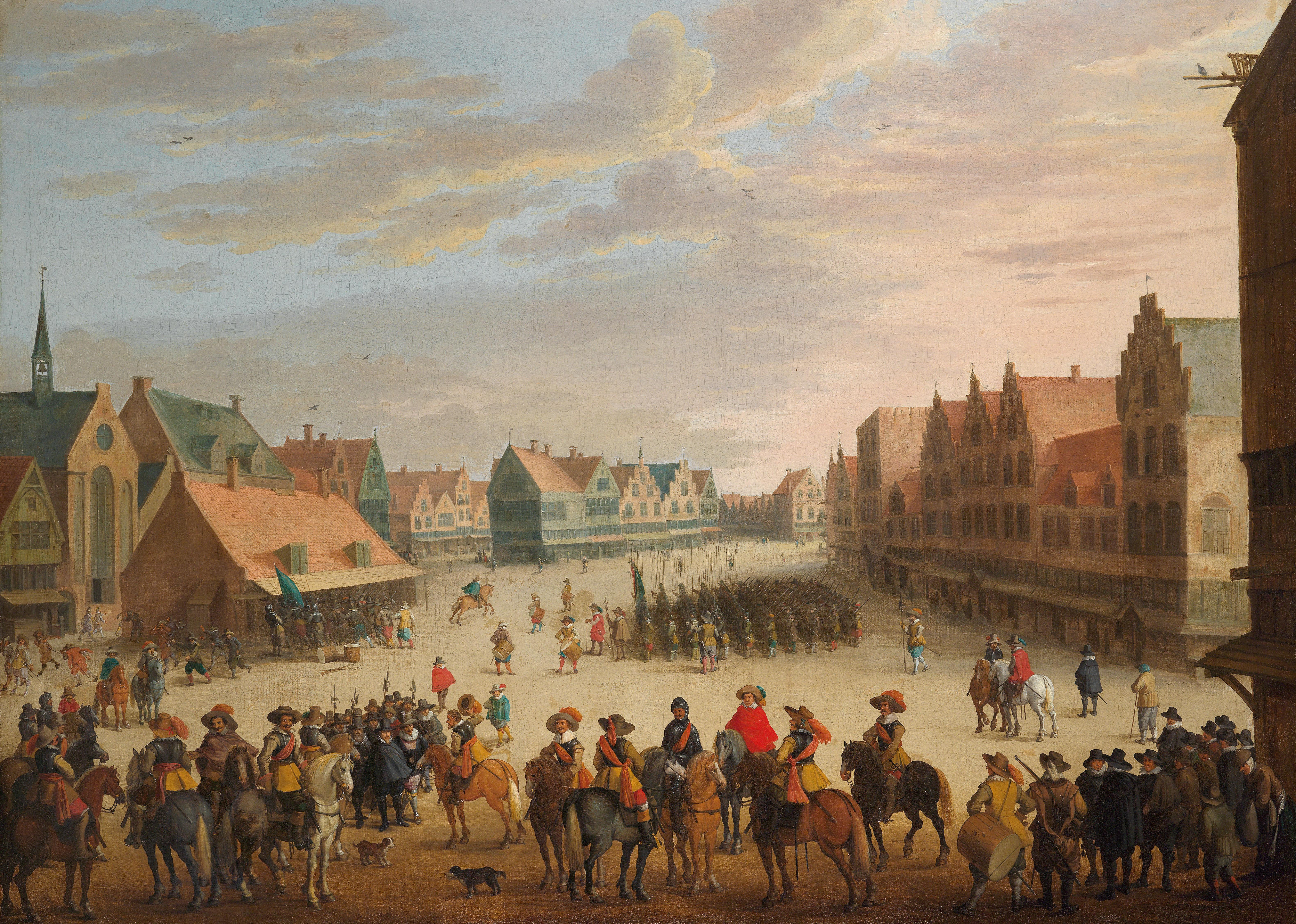 Prince Maurice of Orange dismissing the mercenaries in Neude Square in Utrecht on 31 July 1618.label QS:Len,"Prince Maurice of Orange dismissing the mercenaries in Neude Square in Utrecht on 31 July 1618." label QS:Lde,"Die Entlassung der Söldner durch Prinz Moritz von Oranien auf dem Neudeplatz in Utrecht am 31. Juli 1618."